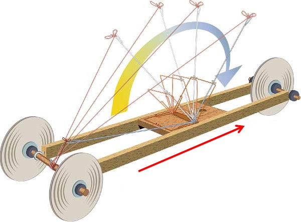 Mausefallenauto